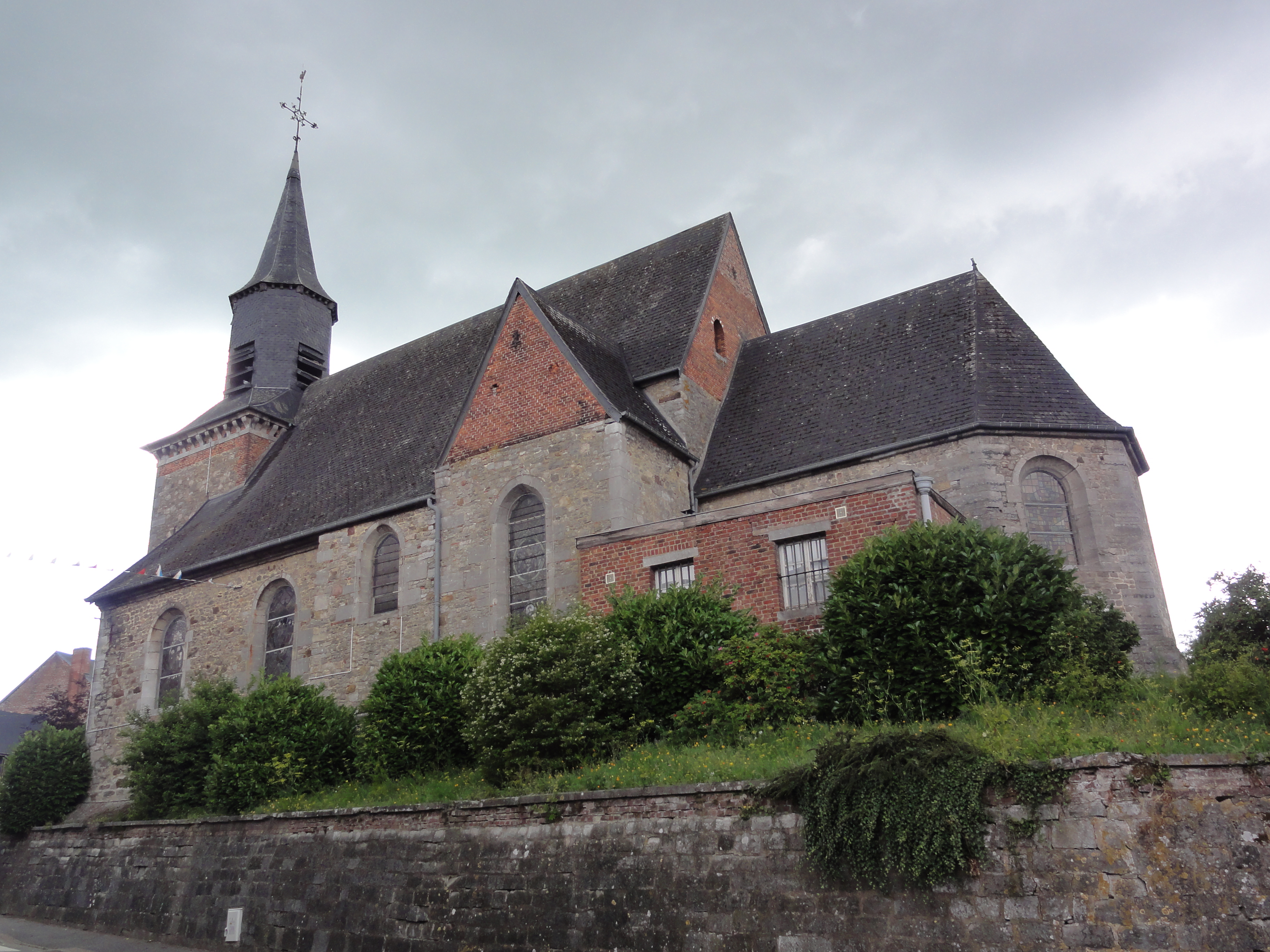 Sains-du-Nord (Nord, Fr) église, vue latérale